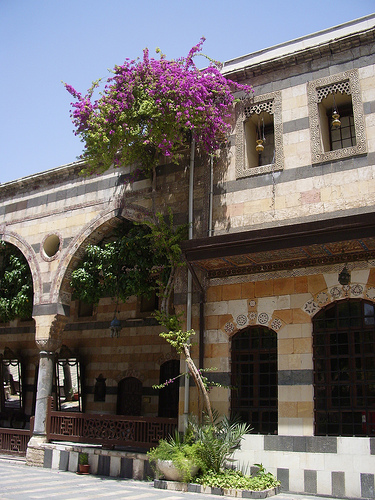 Old Arabic house in Damascus Syria.ورد بنفسجي على جدار بيت عربي دمشقي قديم في سورية.